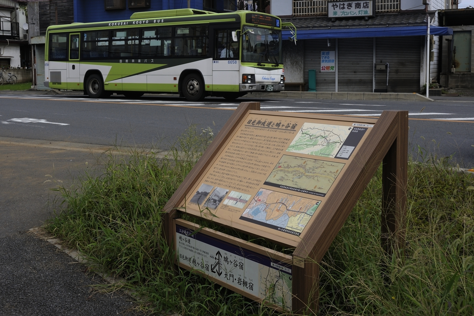 旧鳩ヶ谷ターミナル（現：桜町二丁目付近）に存在する日光御成道と鳩ヶ谷宿の案内